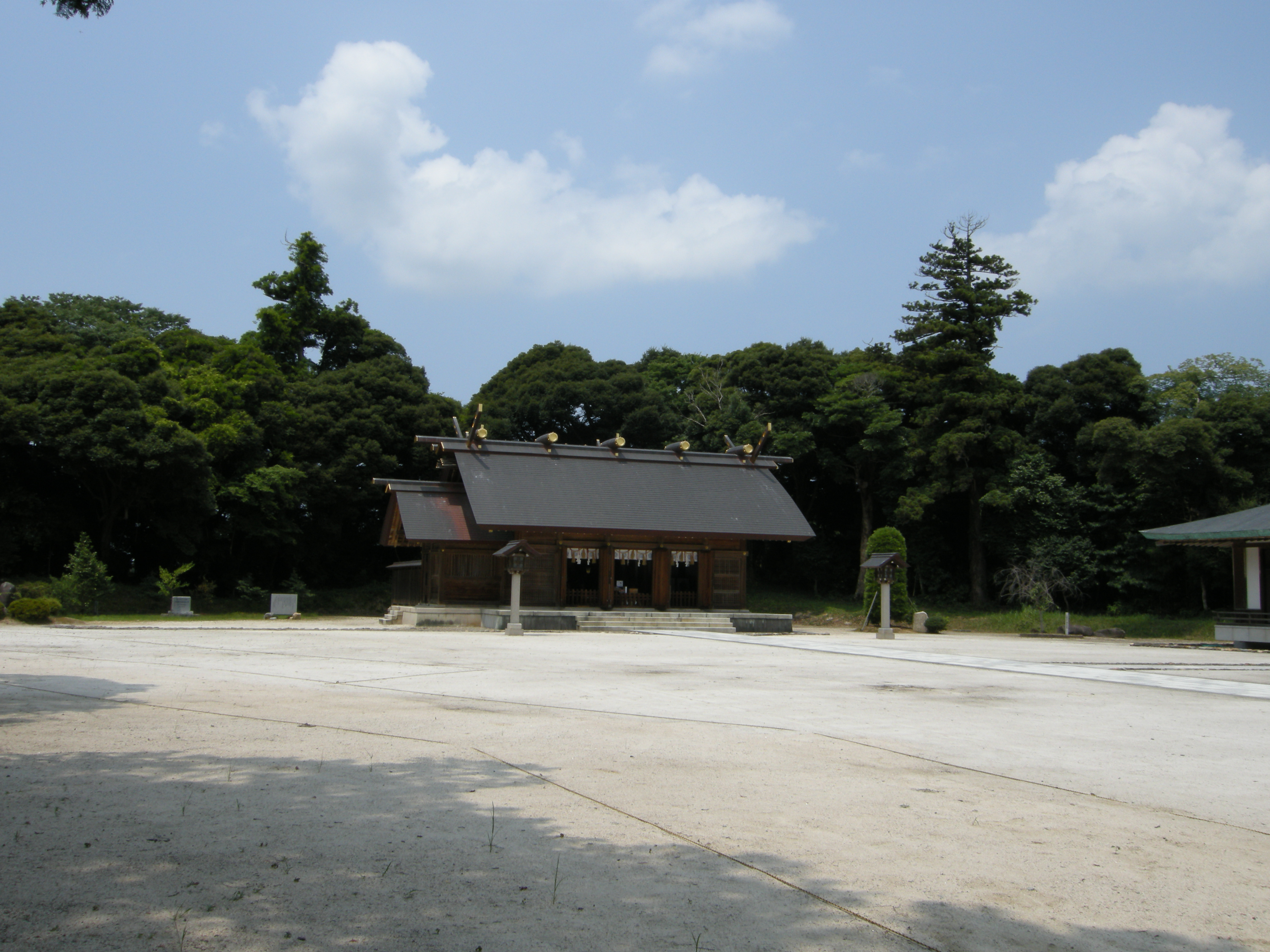 松江護國神社の境内の写真です。